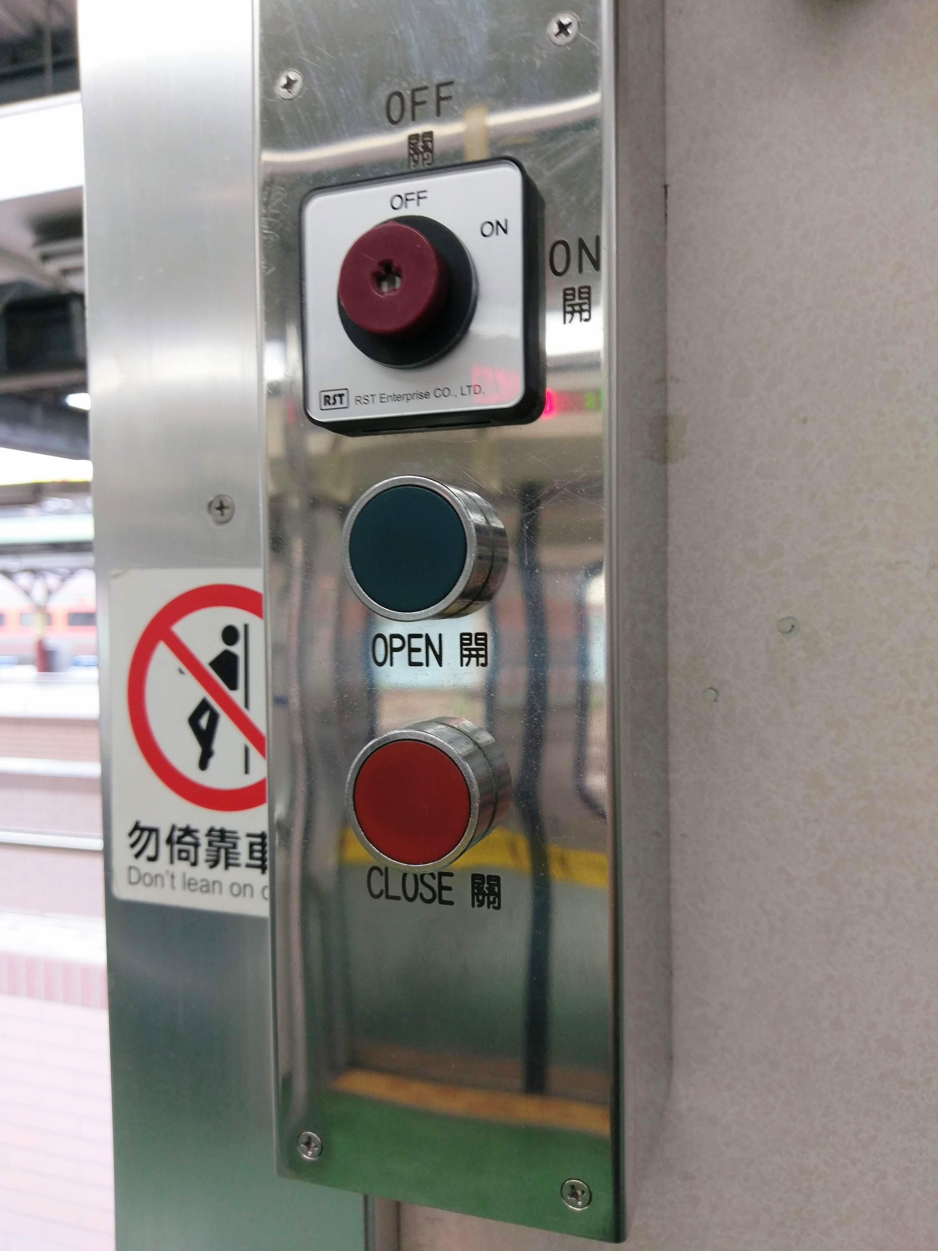 中文（台灣）: 台鐵EMU500型電聯車的車門控制器按鈕